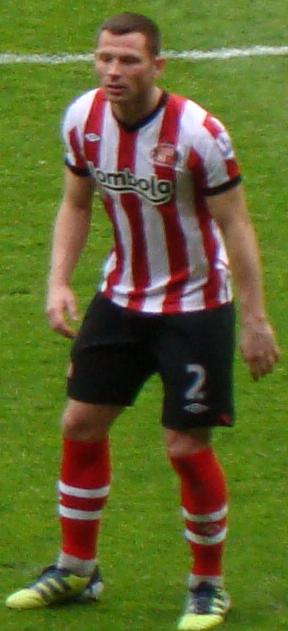 SAFC vs MUFC